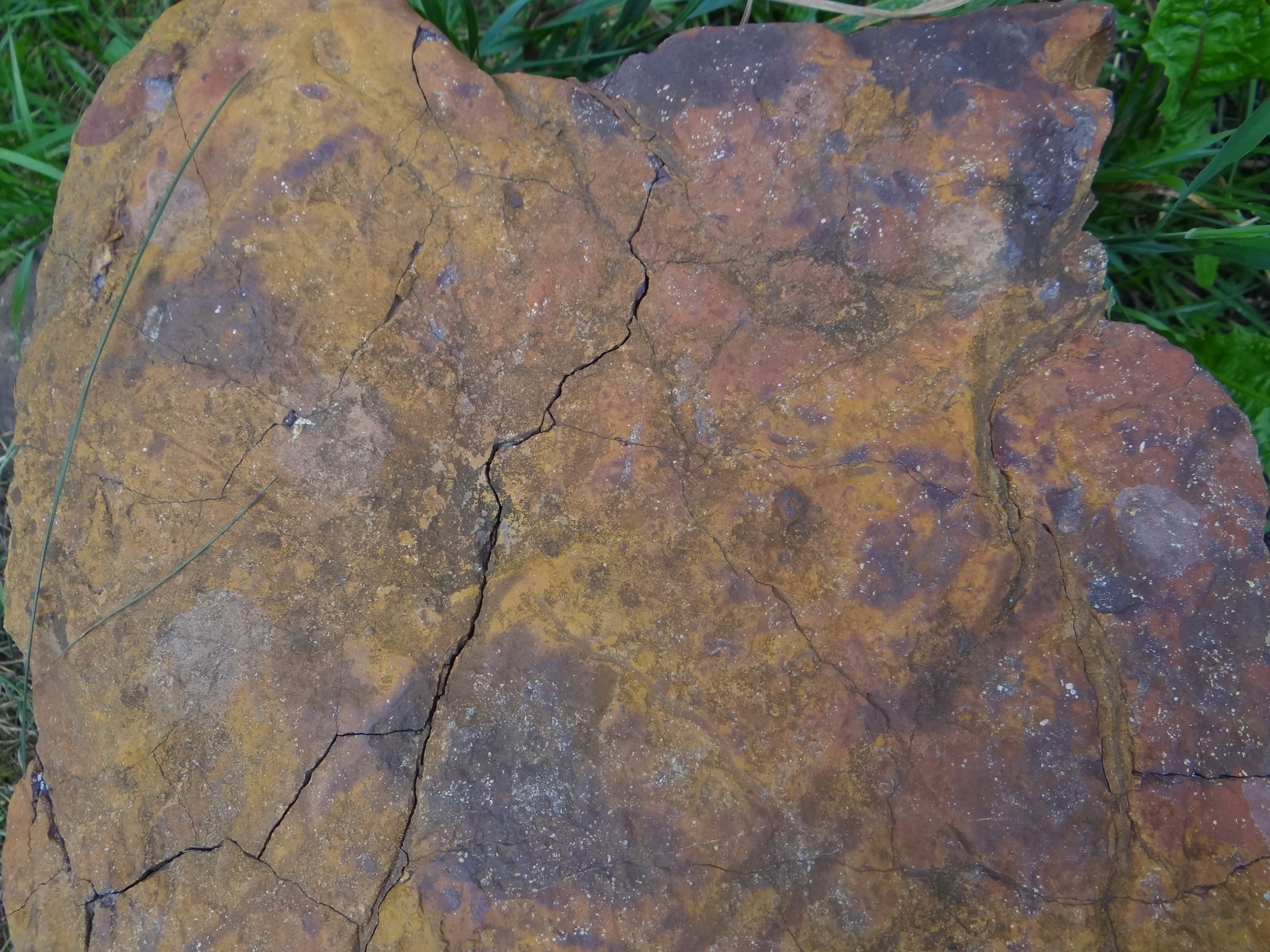 Syderyt. Location: Poland, Częstochowa, wyrobisko cegielni